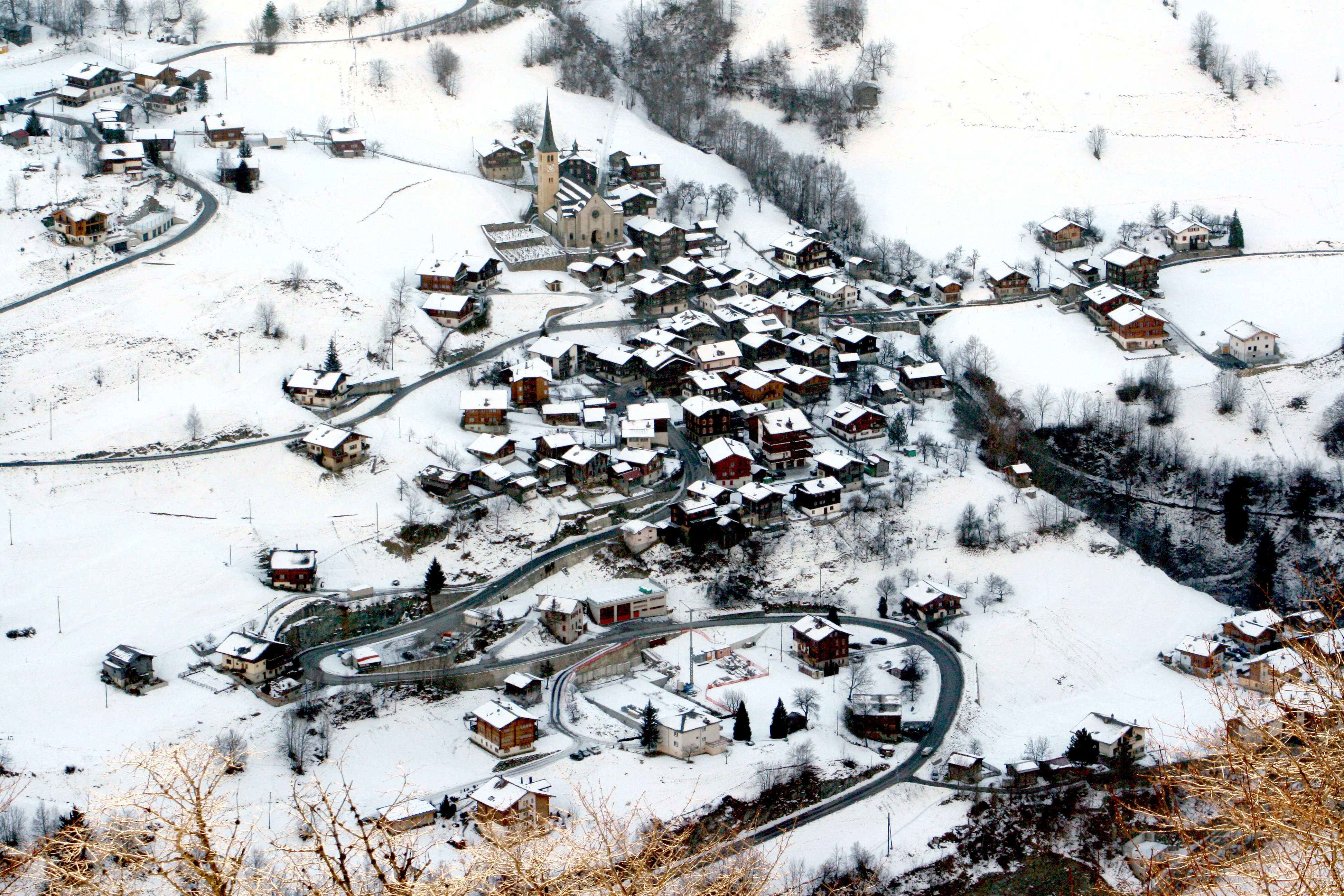 Grengiols, Switzerland in Winter